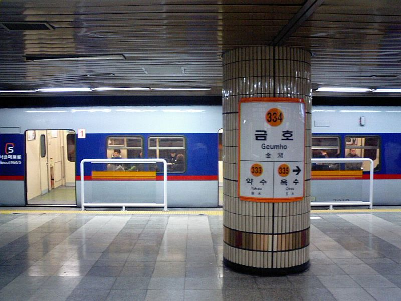 서울메트로 3호선 금호선 홈